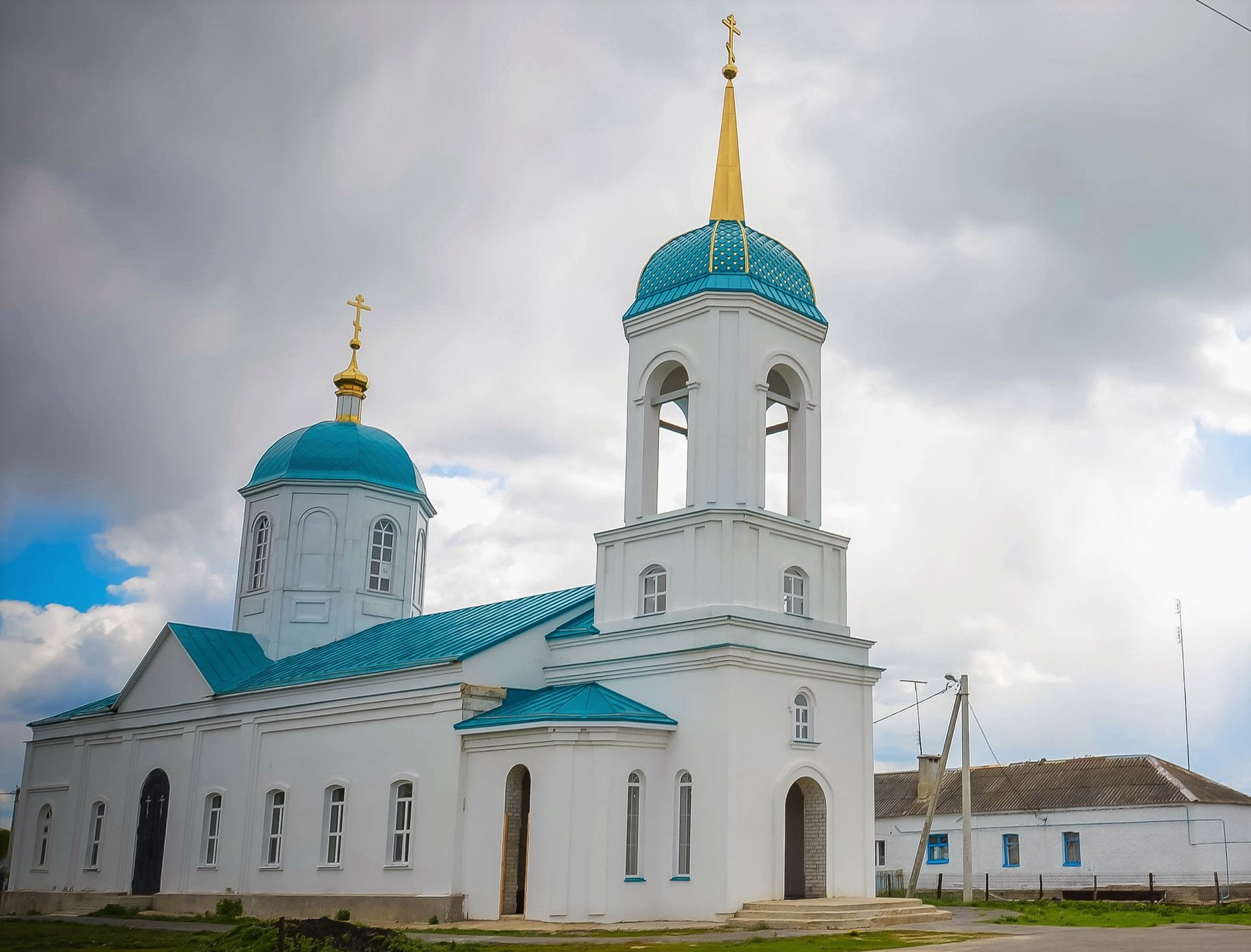 Храм Никольский: Паршиновка, Липецкая область